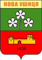 Герб города Новая Ушица